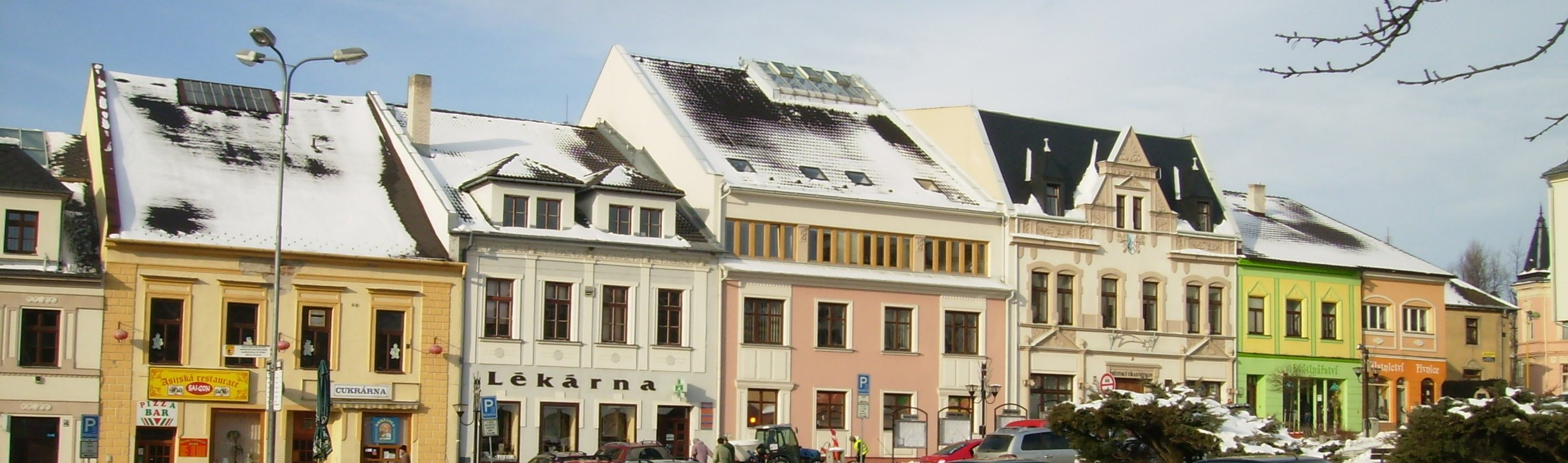 Náměstí ve Vítkově